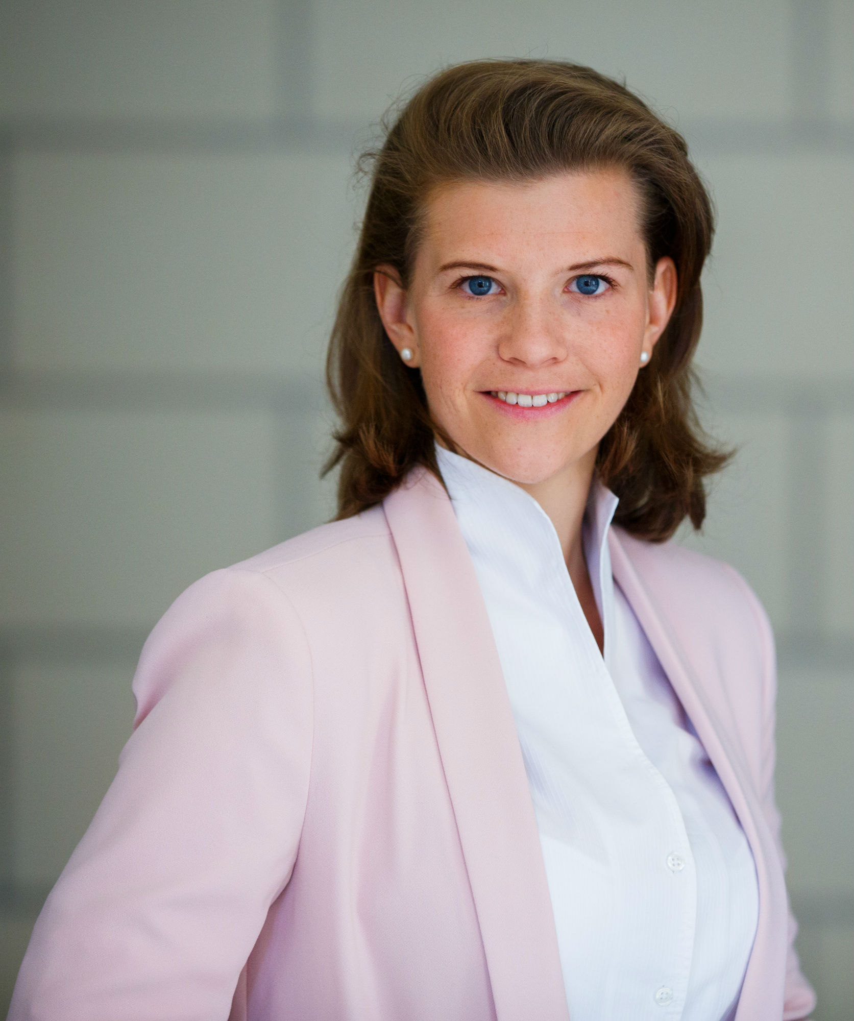 Dipl.-Ing. Elisabeth Olischar